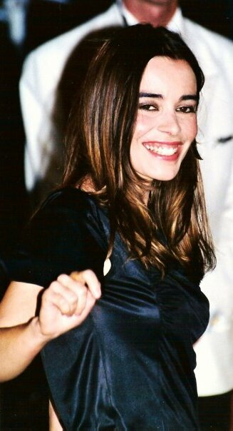 Elodie Bouchez au festival de Cannes